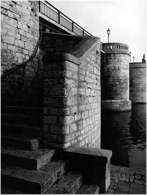 Treppenaufgang Alte Mainbrücke in Kitzingen